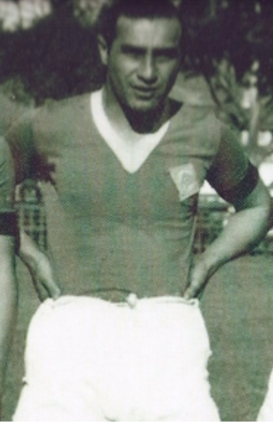 Niginho en 1936